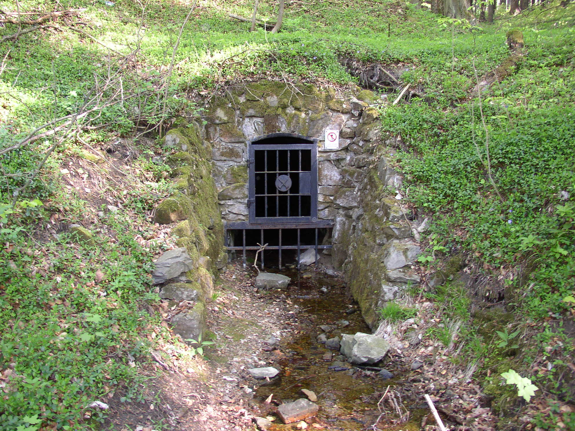 Vstup do štoly v přírodní rezervaci Vápenka, krásná Lípa, okres Děčín, Ústecký kraj, Čská republika